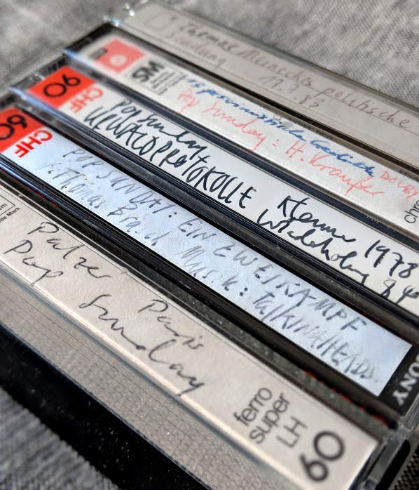 Private Mitschnitte von Pop Sunday Sendungen auf Cassette. Hier beispielhaft: Thomas Meinecke, Helmut Krausser, Ulrich Klenner, Thomas Brasch, Thomas Palzer. Alle Sendungen liefen um das Jahr 1980 (plusminus 3) herum im 2. Programm des Bayerischen Rundfunks.